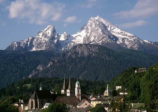 Berchtesgaden mit Watzmann, Deutschland.